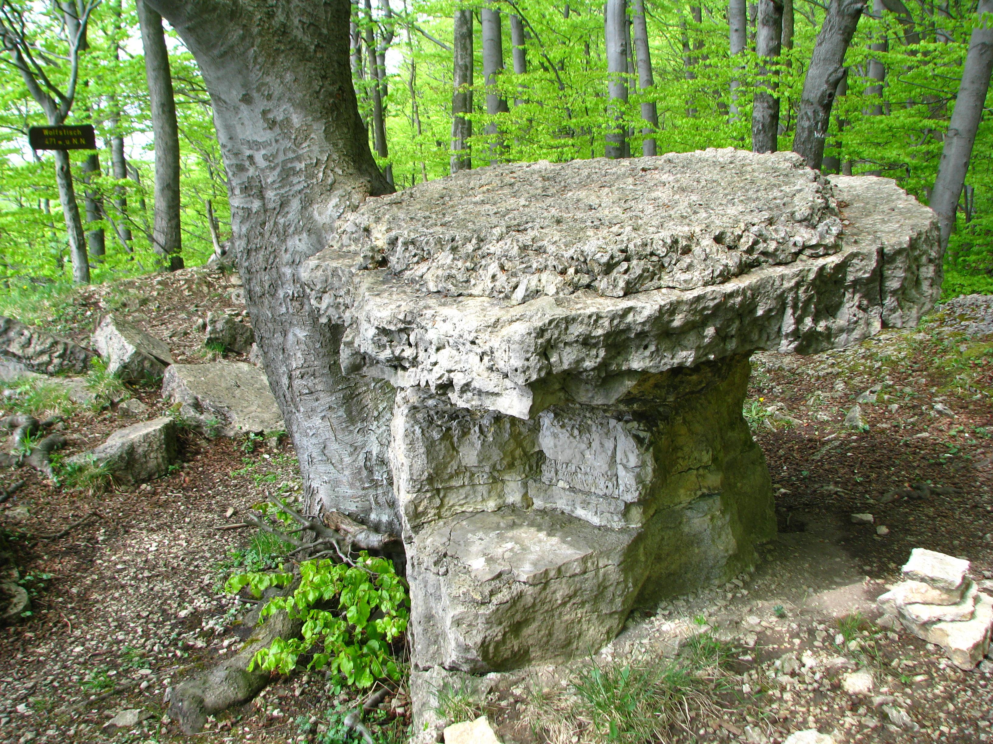 Der Wolfstisch auf der Gobert, ein tischförmiges Schichtpaket. Eine Buche ist daran empor gewachsen.